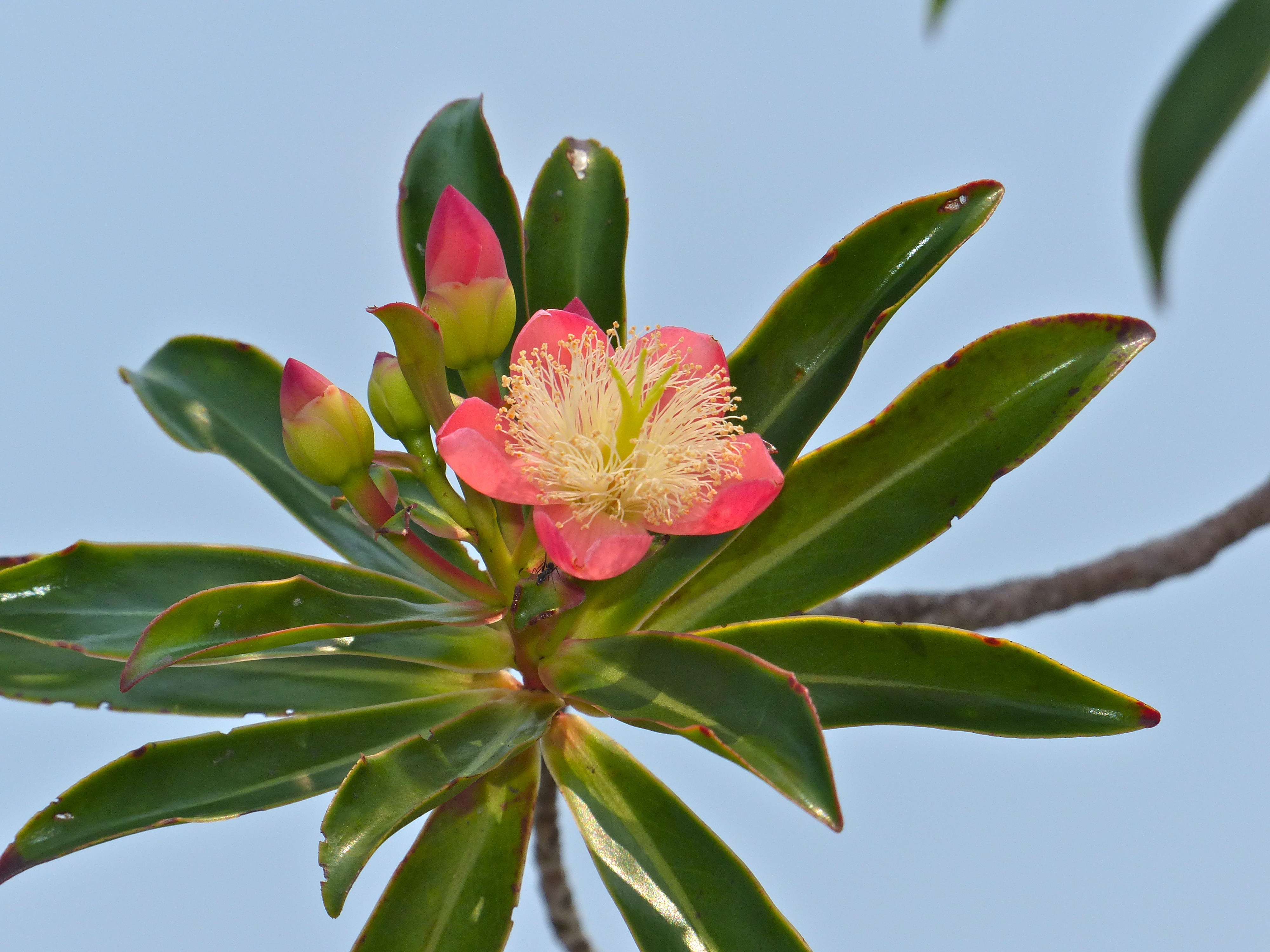 Lintang Trail, Bako NP, Sarawak, MALAYSIA